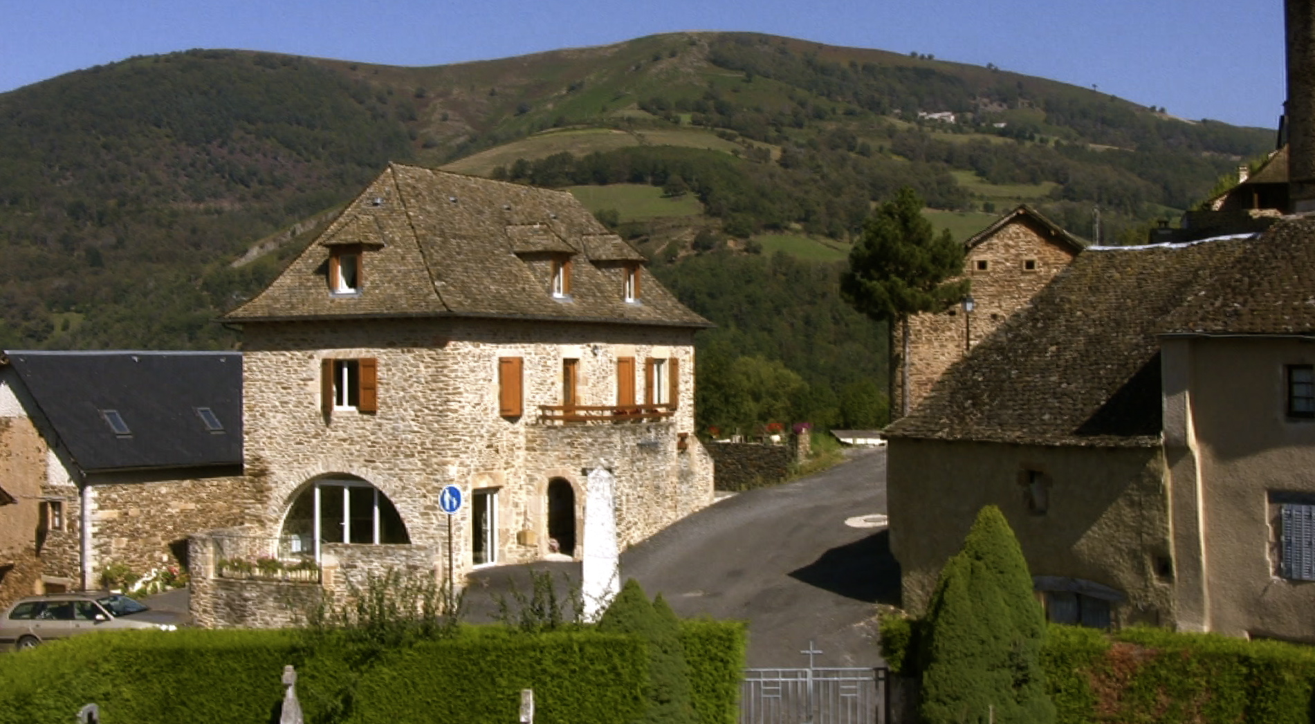 Mairie de Pomayrols (Aveyron France)